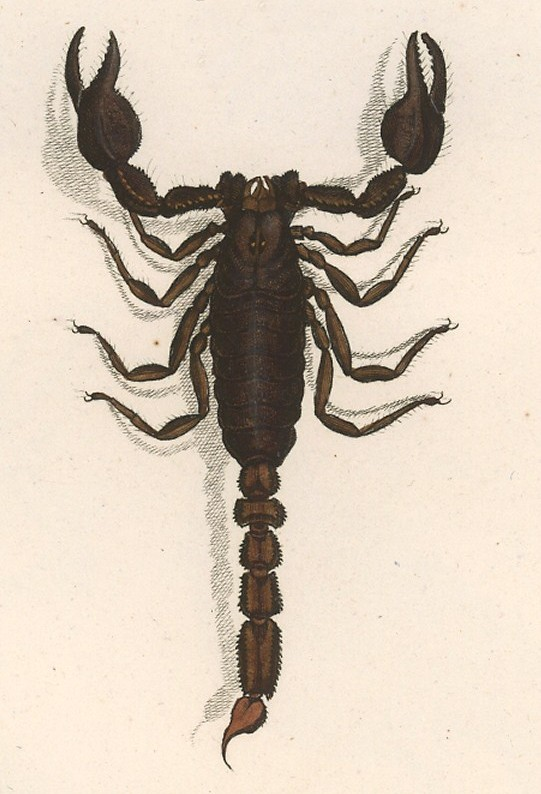 Scorpio maurus